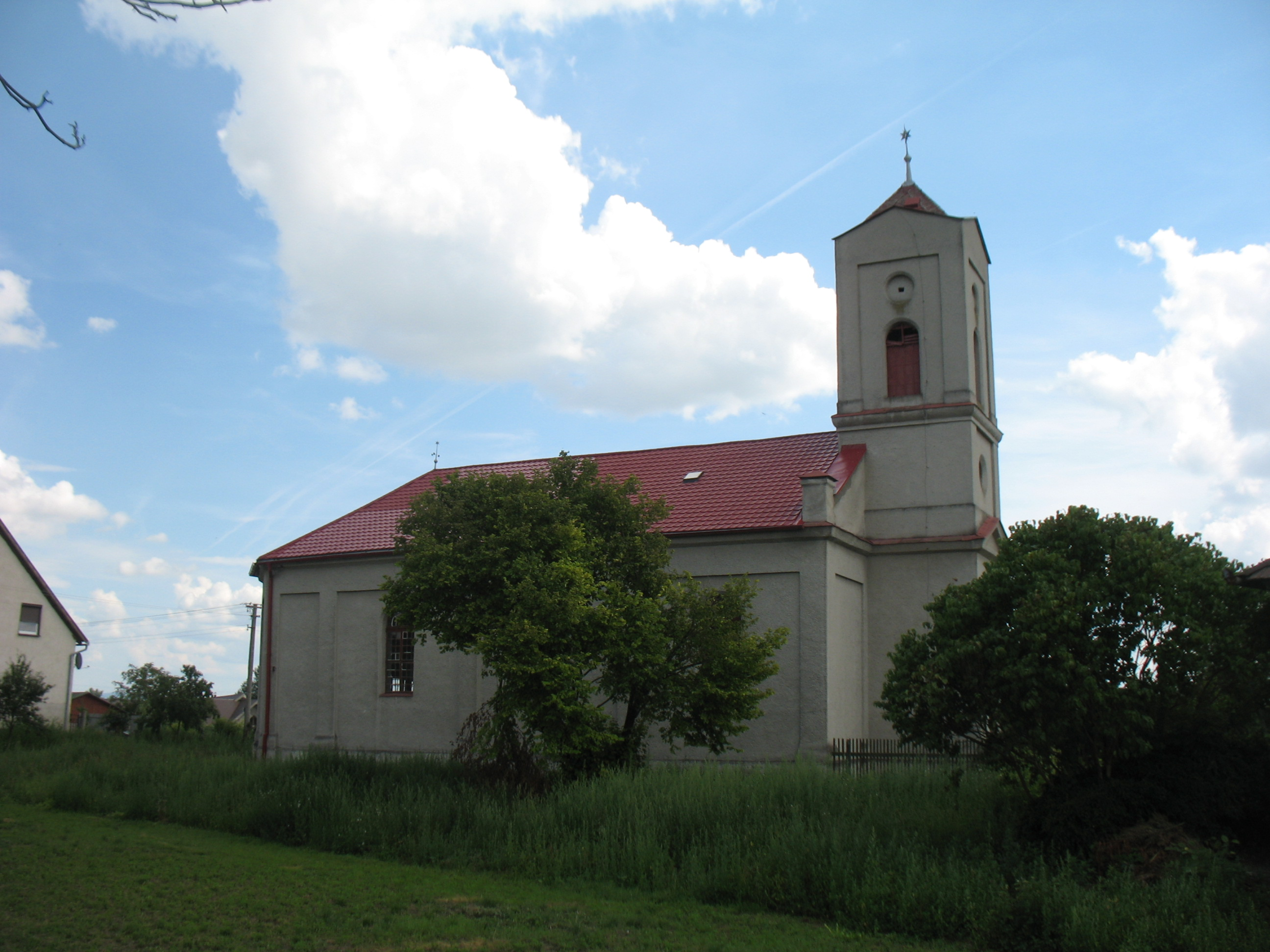 Garamszentgyörgy